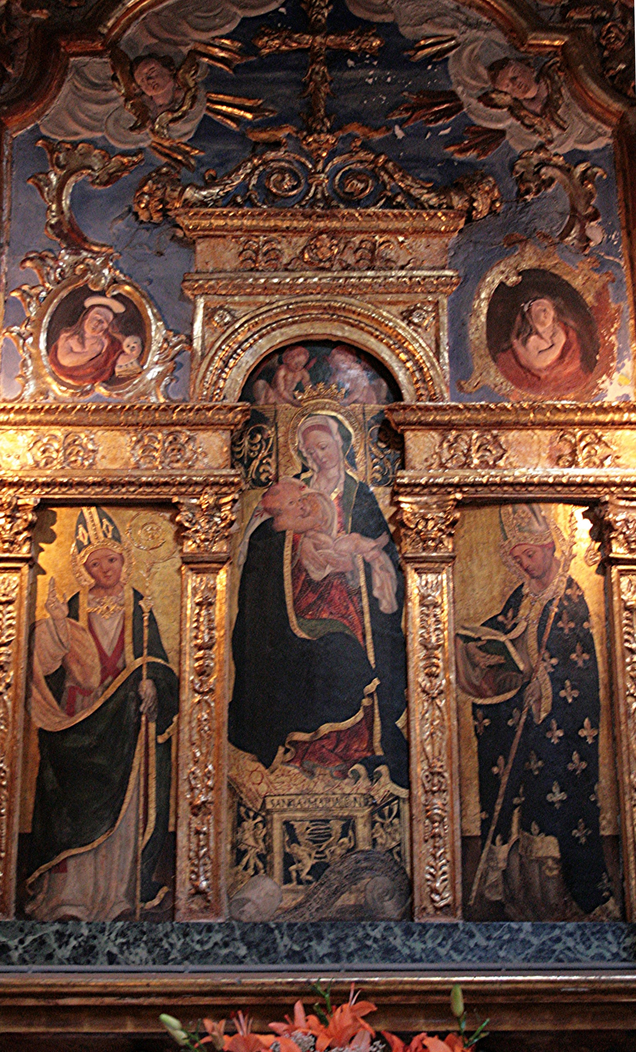 Retable "primitif niçois" de Bastien Fuseri (début 16e siècle) dans un encadrement baroque fin 17e.